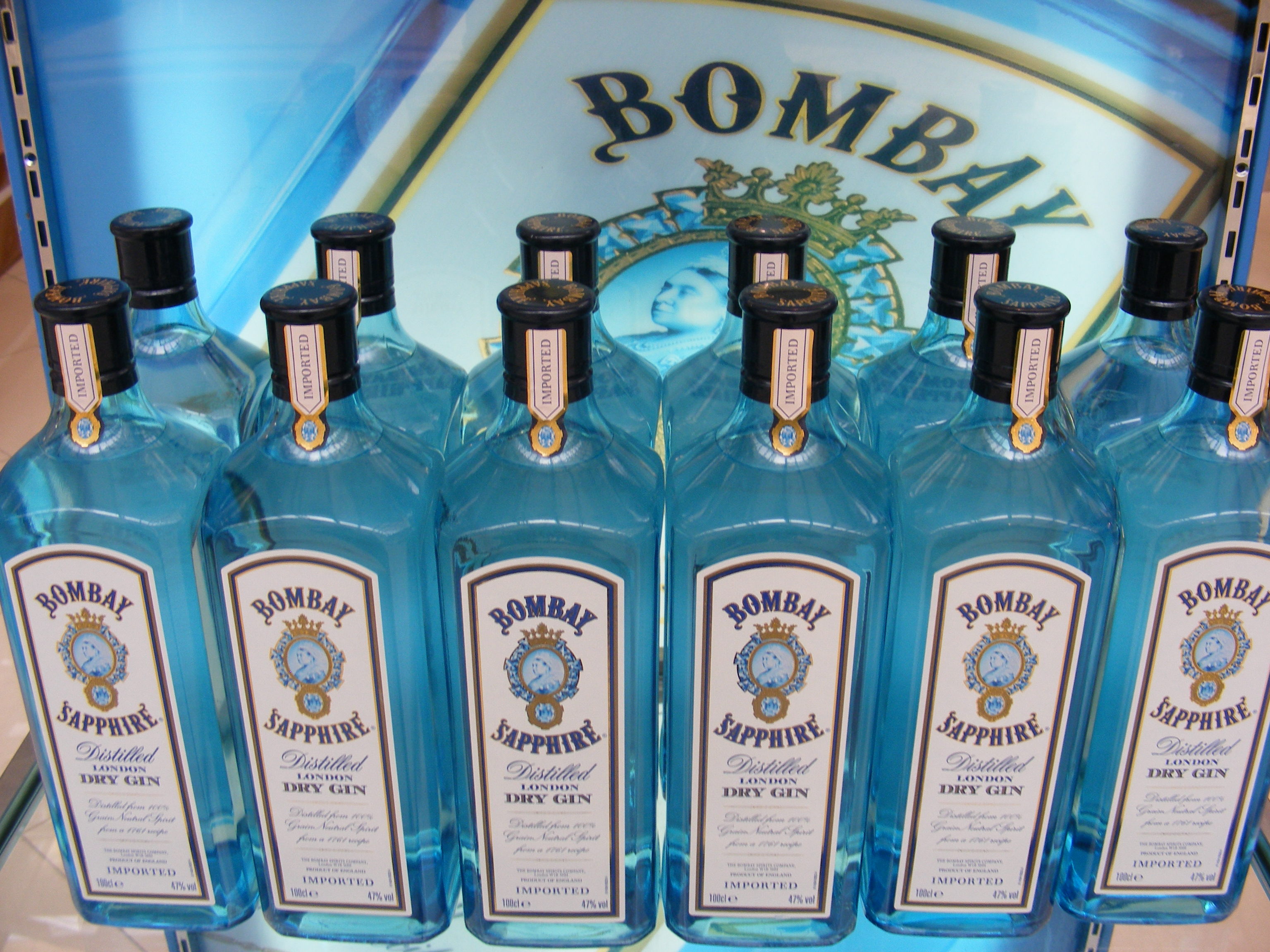 bouteilles de Bombay Sapphire - (Aéroport international de Bangkok-Suvarnabhumi, Thaïlande)